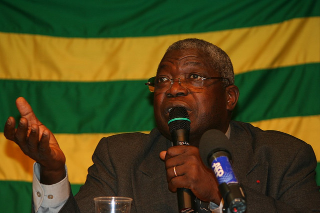 Kofi Yamgnane à Quimper